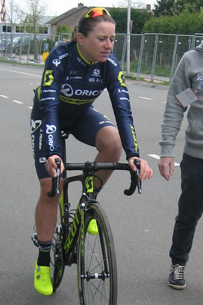 Na de finish van de Amstel Gold Race Ladies Edition 2017.